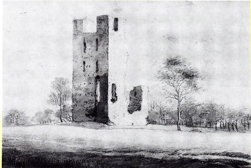 Kasteel te Vliet (Castle at Vliet) near Oudewater, the Netherlands.